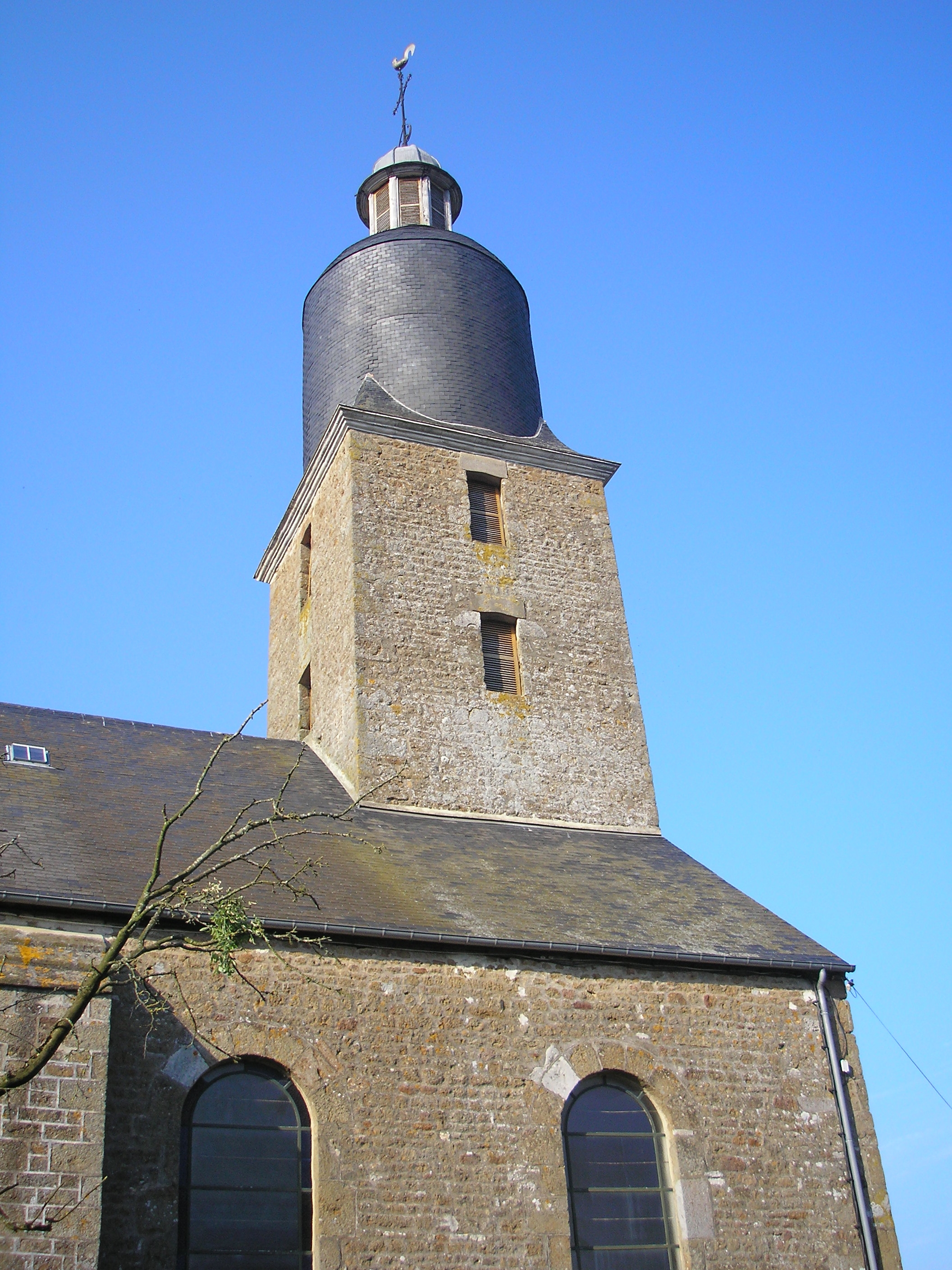 Putanges-Pont-Écrepin (Normandie, France). L'église Saint-Ouen de Pont-Écrepin.